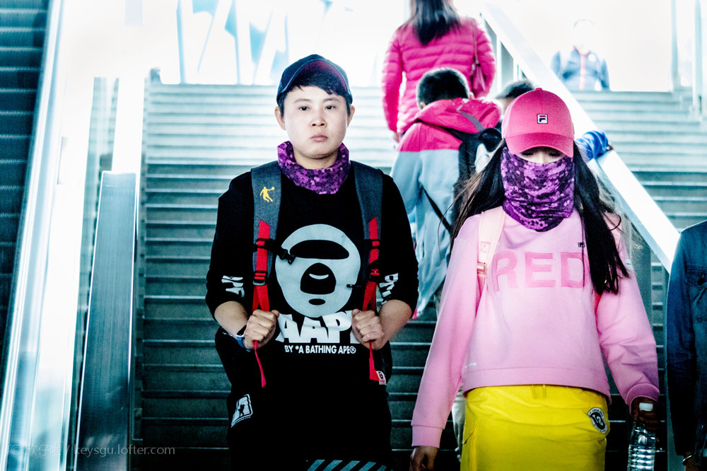 中文（中国大陆）: 2016.3.28《非凡搭档》广州站录制